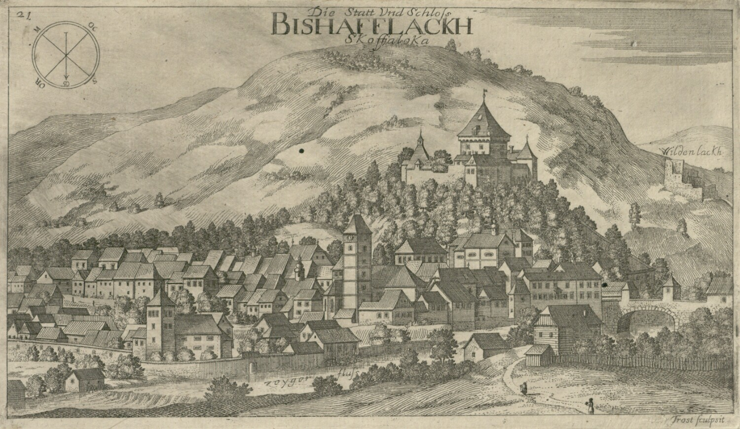 Škofja Loka z gradom